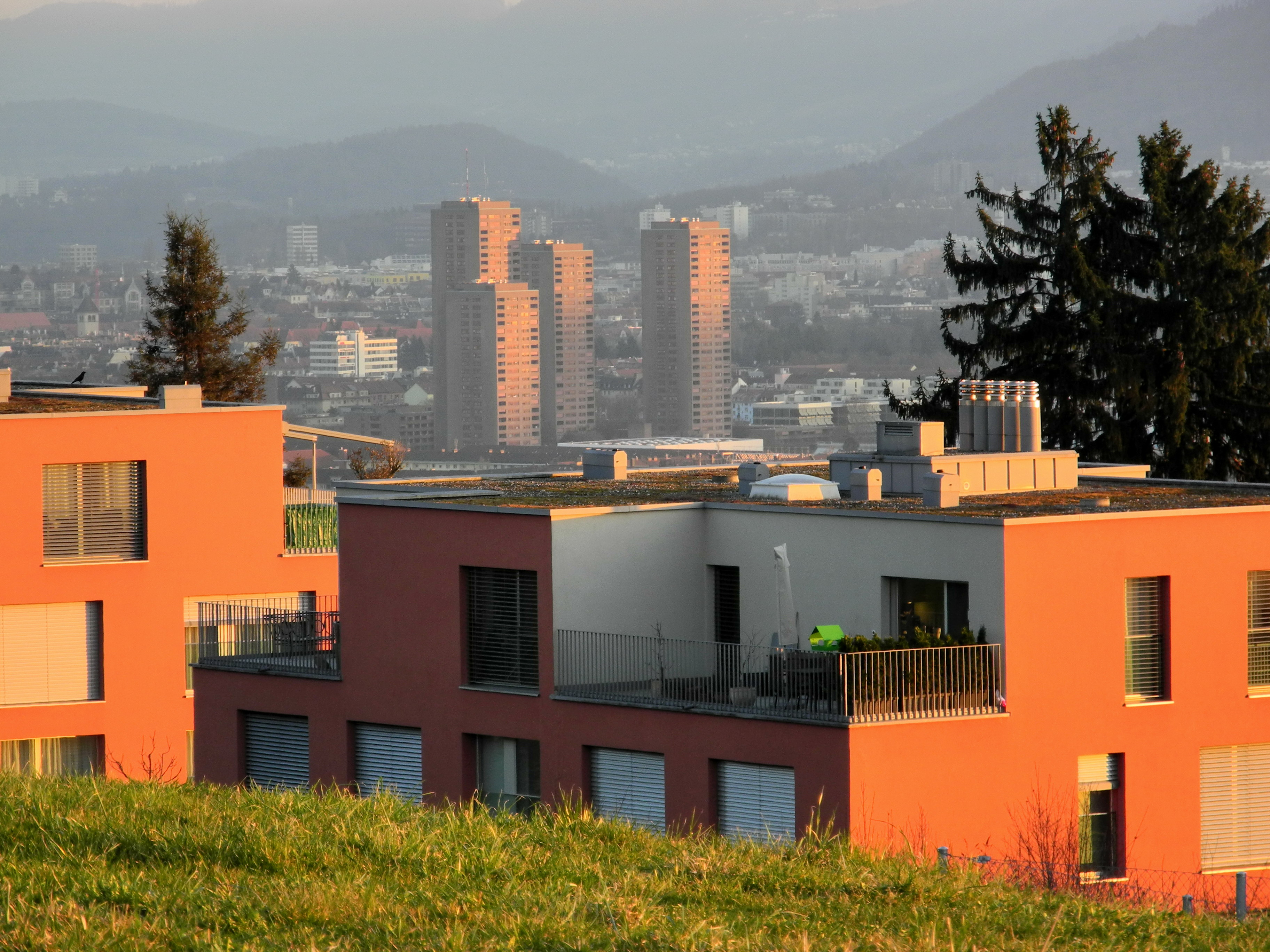 Zürich-Hard and Industrie as seen from Hönggerberg in Zürich-Höngg (Switzerland), Sihl valley in the background.